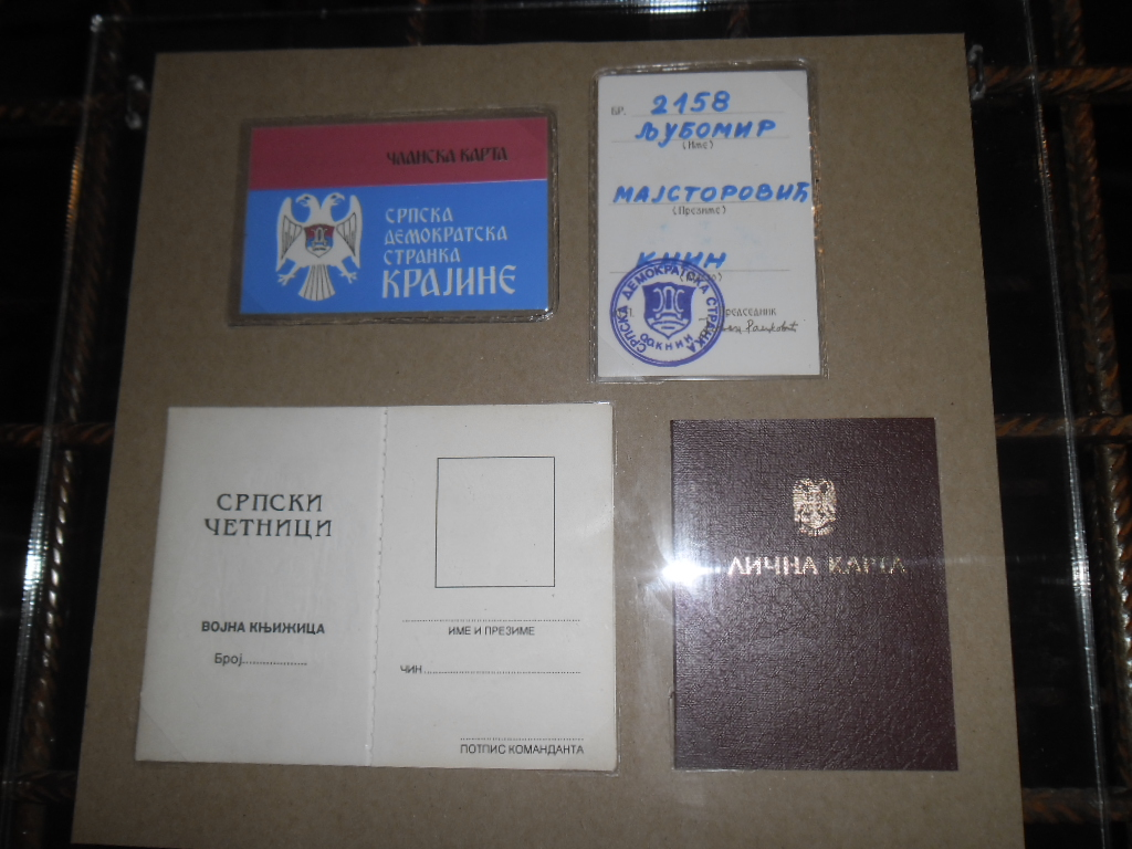 isprave iz doba tzv. RSK, Muzej Oluje na kninskoj tvrđavi